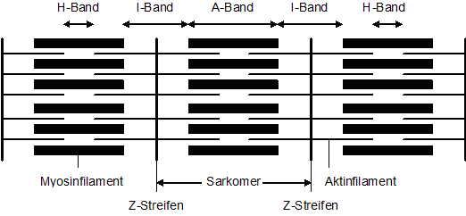 Muskelfibrille (Bau des Sarkomers)